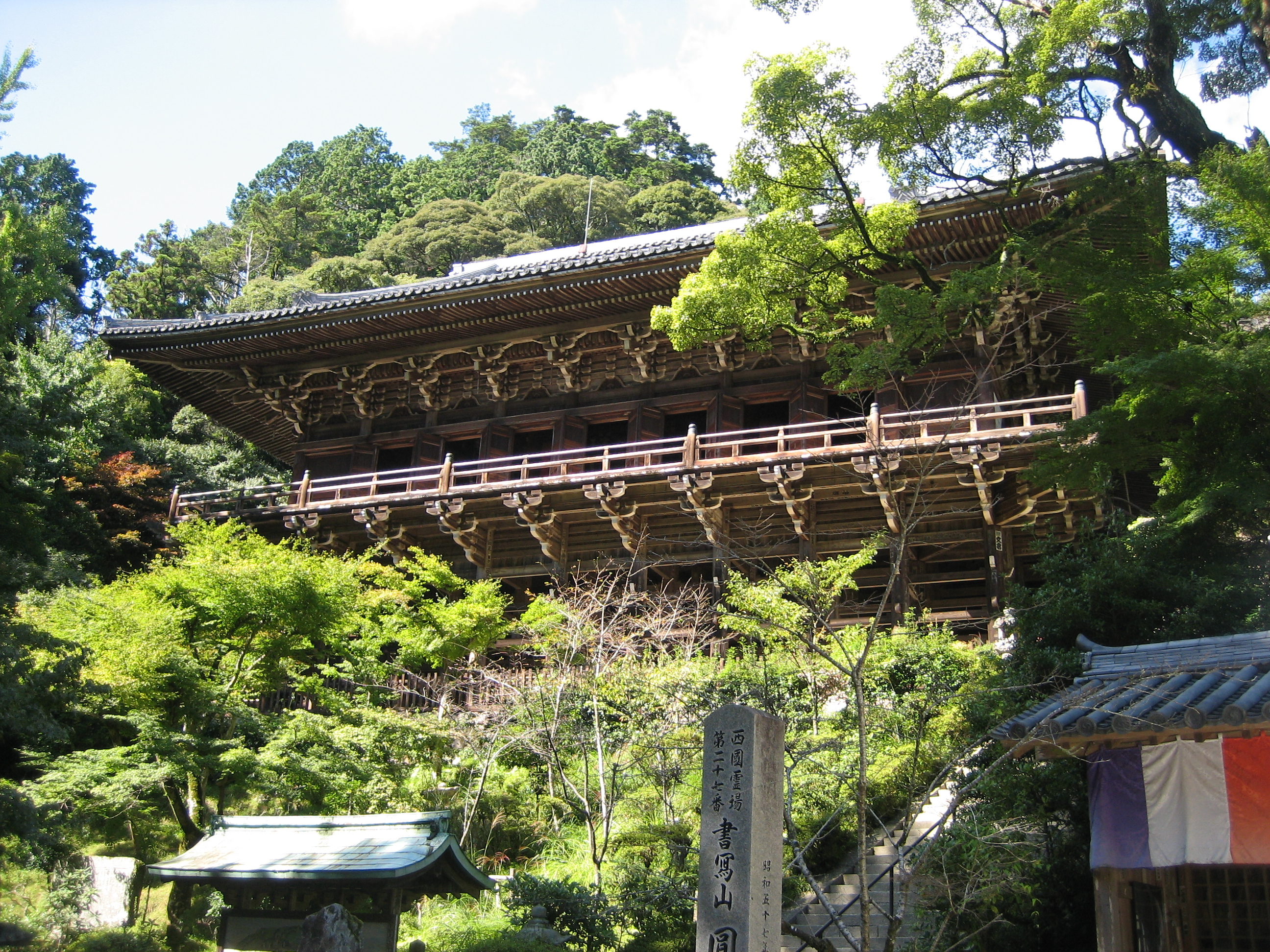 書写山円教寺の摩尼殿。